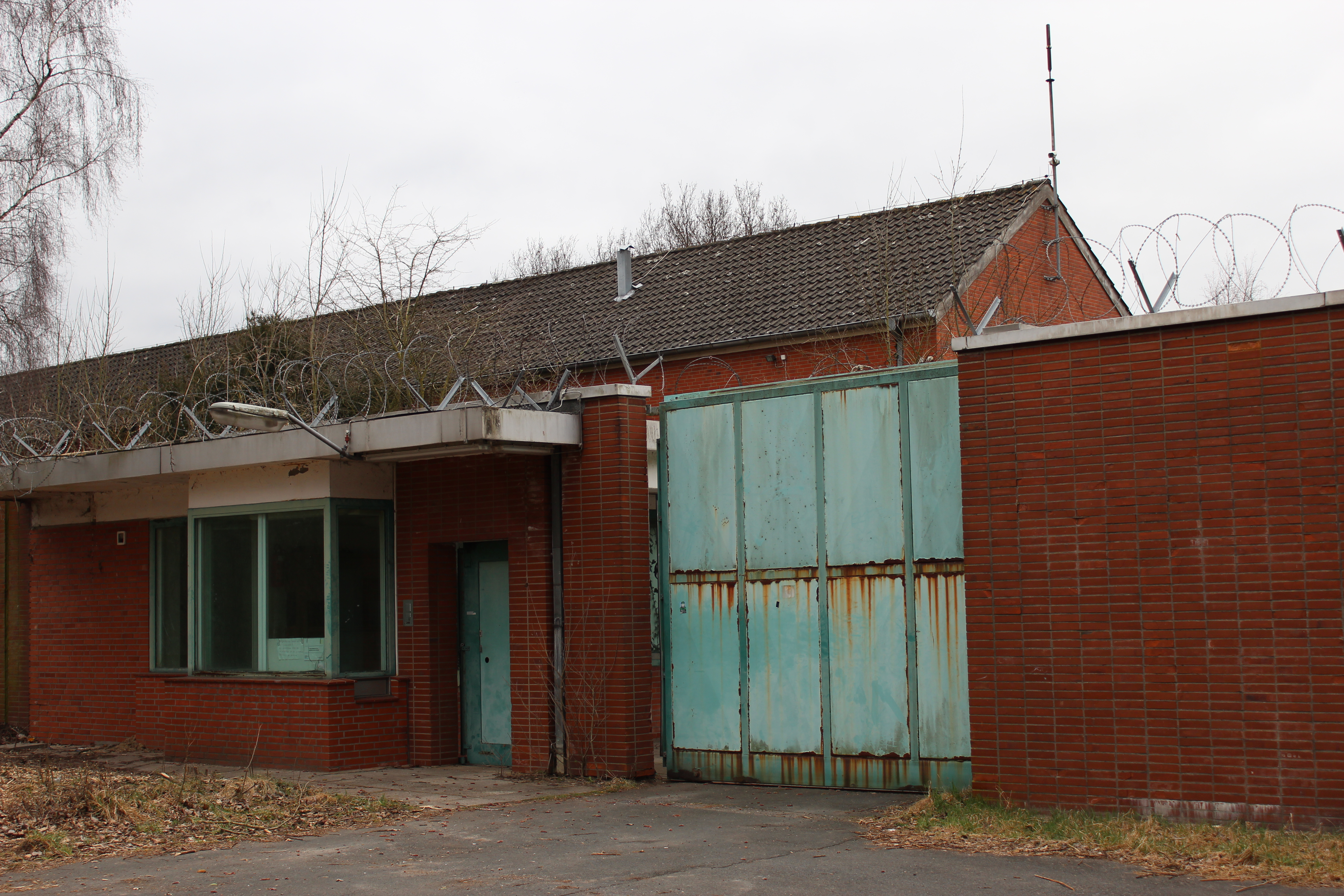 Eingang der ehemaligen Jugendvollzugsanstalt Bremen-Blockland an der Carl-Krohne-Straße